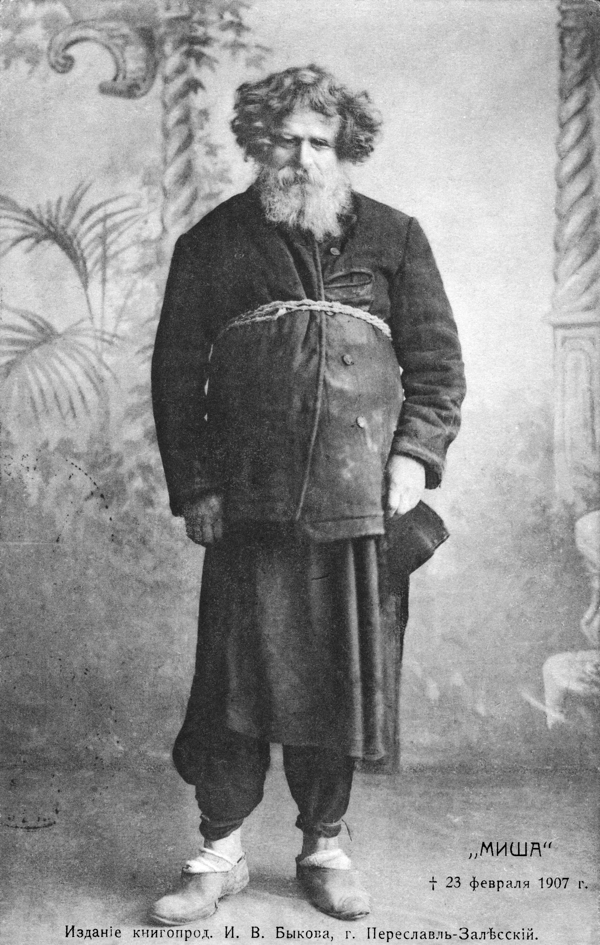 Местночтимый святой юродивый Миша-Самуил